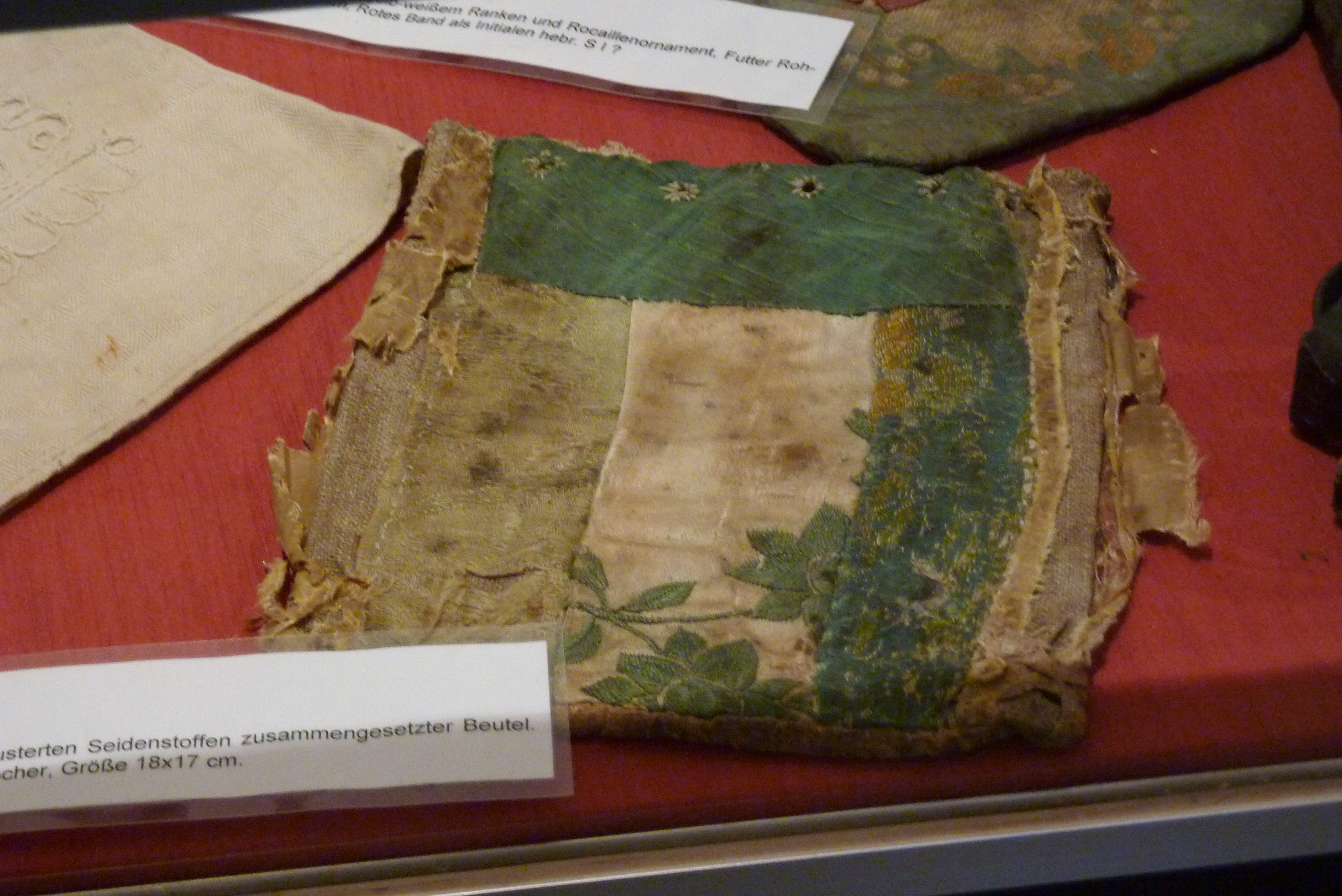 Genisa Niederzissen, Ausstellung in der ehemaligen Synagoge in Niederzissen im Landkreis Ahrweiler (Rheinland-Pfalz), Beutel für Tefillin (Gebetsriemen) aus der zweiten Hälfte des 18. Jahrhunderts aus verschiedenen Seidenstoffen; s. Falk Wiesemann (Hrsg.): Zeugnisse jüdischen Lebens in Niederzissen. Genisa-Funde in der ehemaligen Synagoge. Kultur- und Heimatverein Niederzissen, Niederzissen 2012, ISBN 978-3-00-039493-5